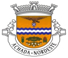 Brasão da Junta de Freguesia de Achada, Nordeste, Açores